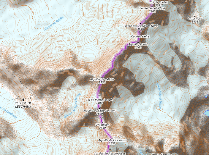 carte réalisée sur umap This map may be incomplete, and may contain errors. Don't rely solely on it for navigation.